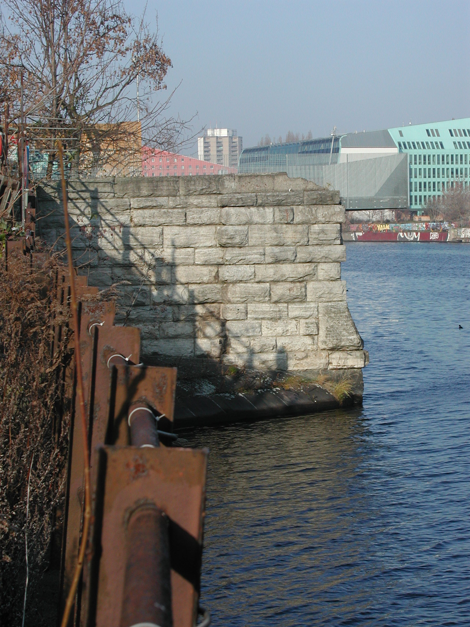 Brommy-Balkon